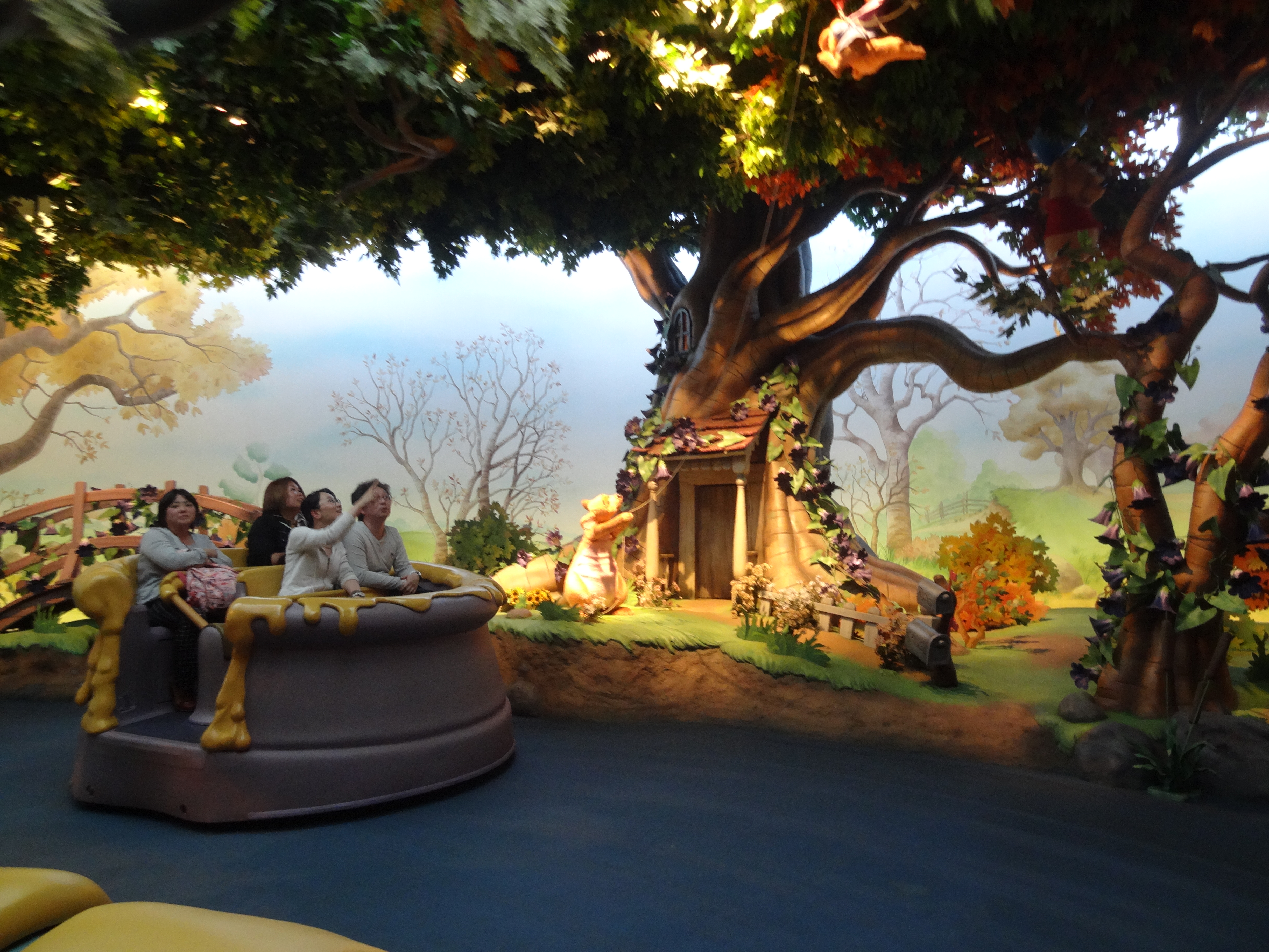 Pooh's Hunny Hunt à Tokyo Disneyland